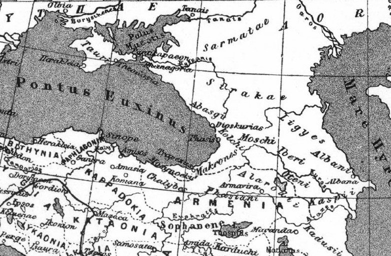 Alexander den stores rike, Nordisk familjebok